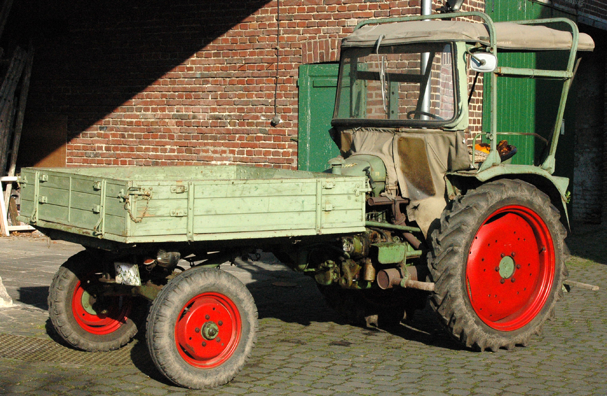 Fendt Geräteträger F 231 GT, Erstzulassung Mai 1971